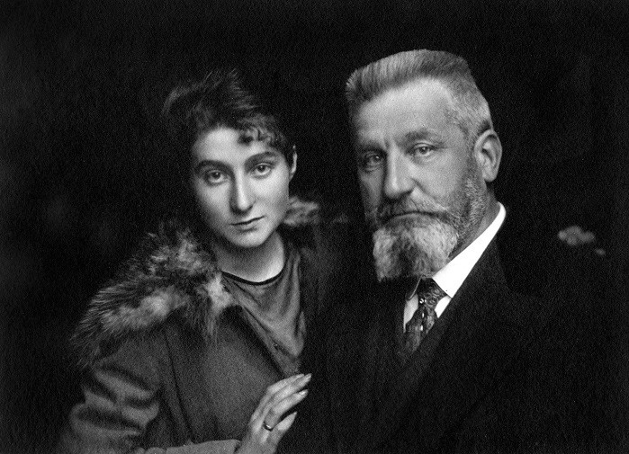 Maria Sassi con il padre Alfredo